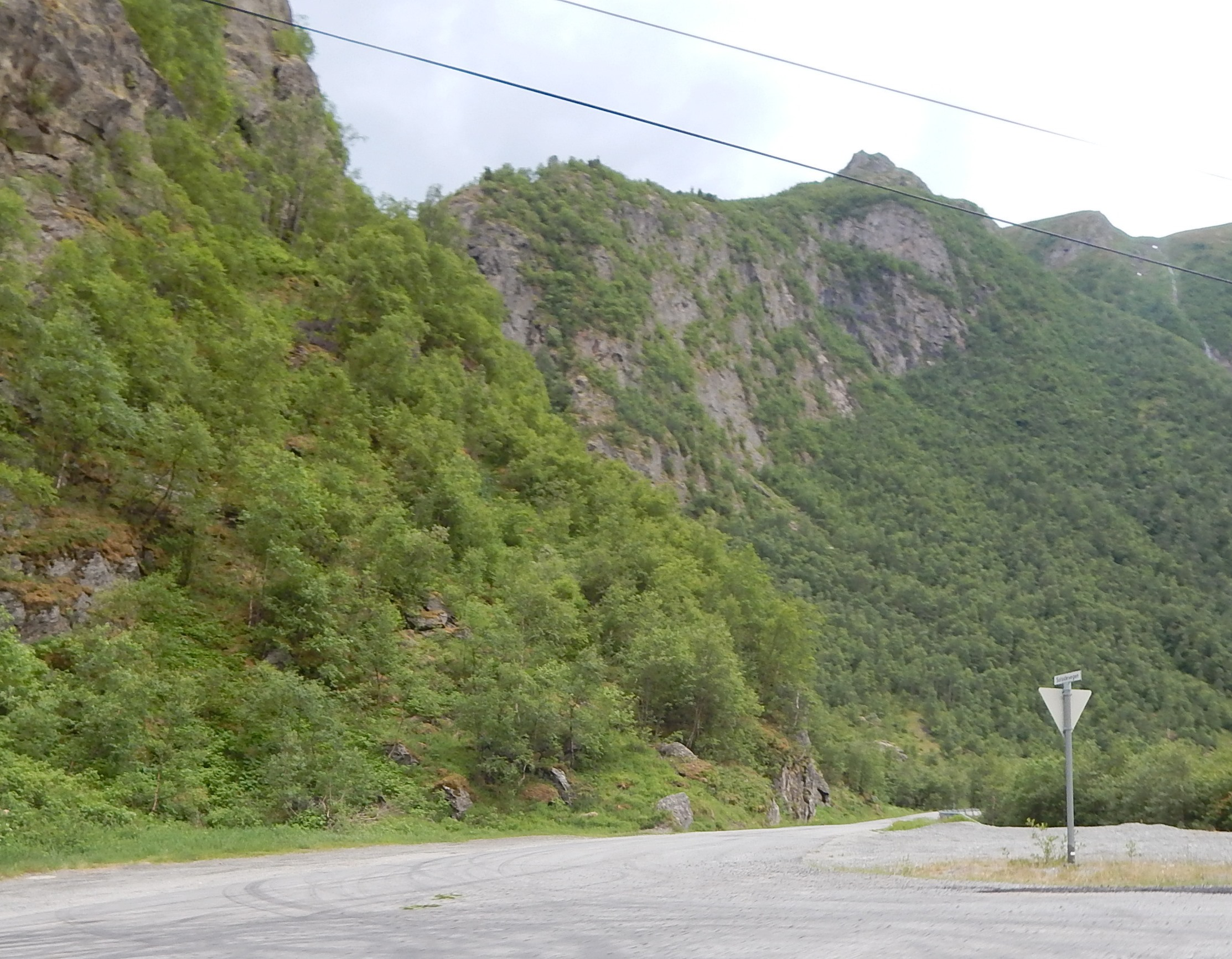 Vestenden av Solsidevegen (fylkesvei 467) sett fra riksvei 15